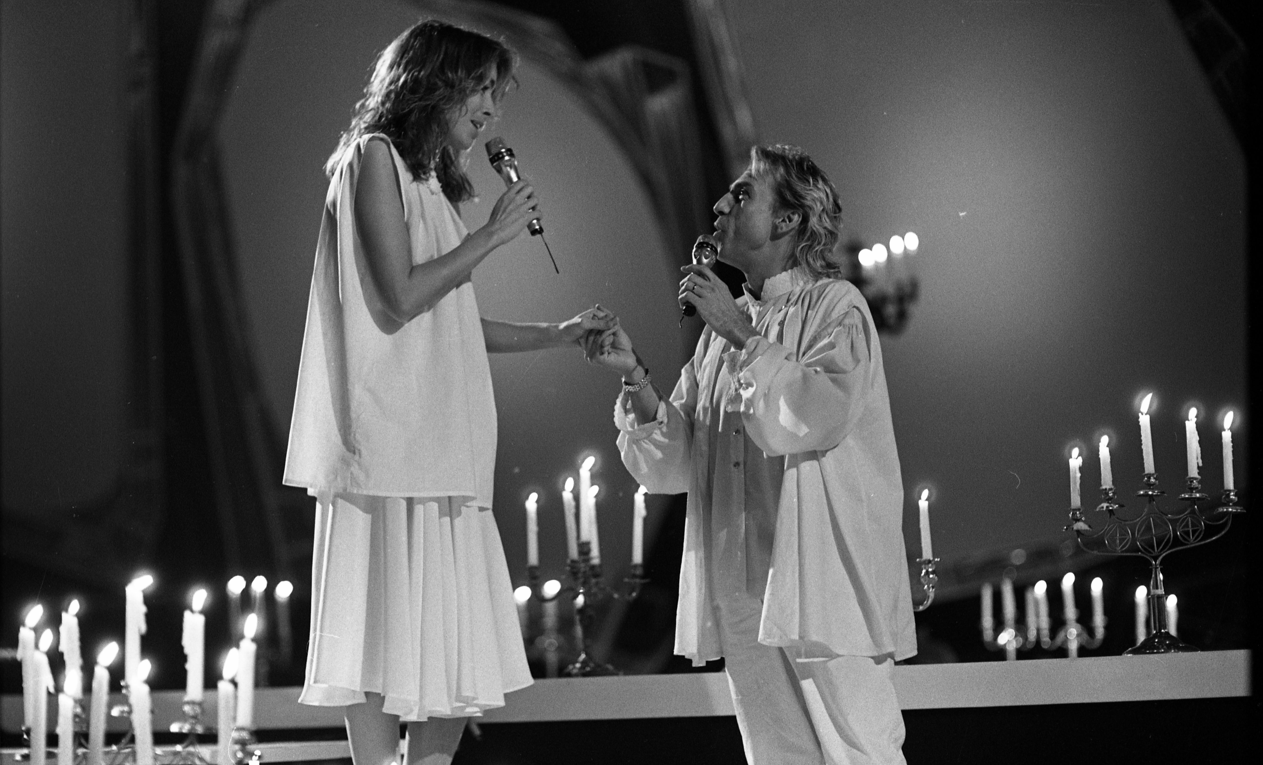 Melodi Grand Prix, norsk finale, 1986. Foto: Bo Mathisen. Arkivref.: PA-0797_U_13638_006_020